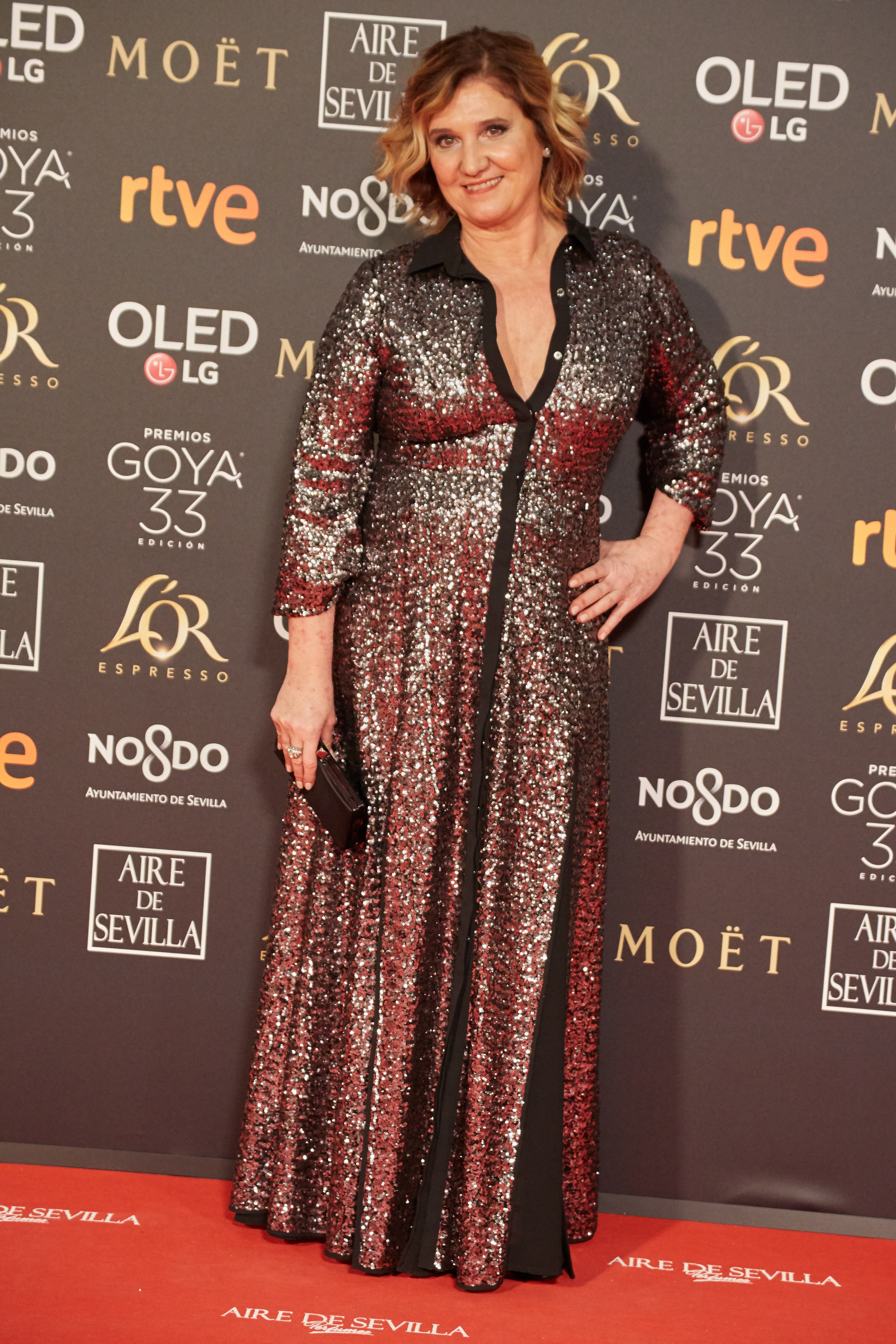 Ana Wagener en la alfombra roja de los Premios Goya celebrados en Sevilla en Febrero 2019